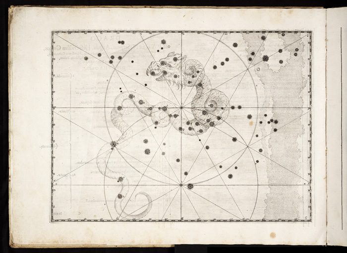 La constelacion de Draco en Uranometria